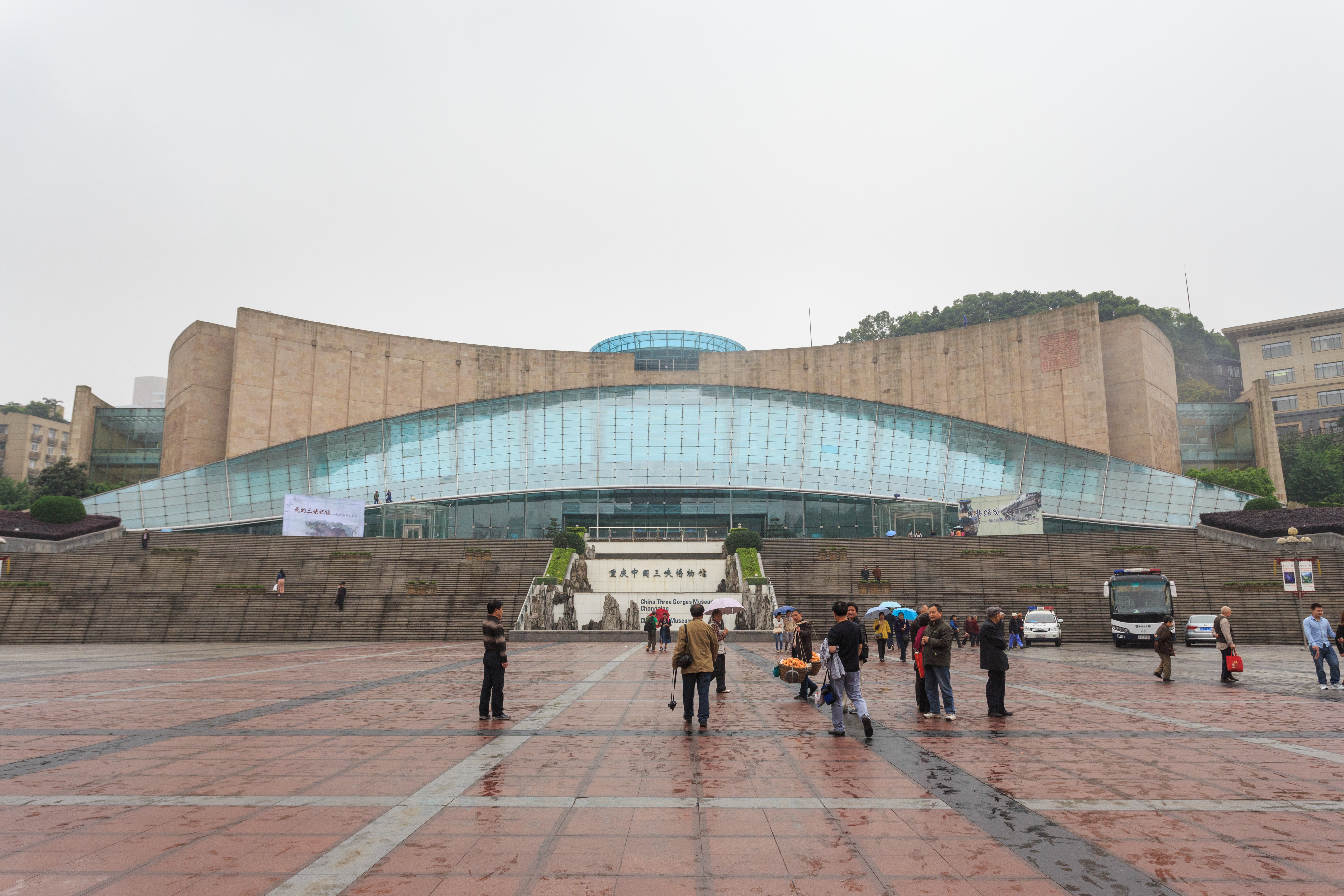 重庆中国三峡博物馆